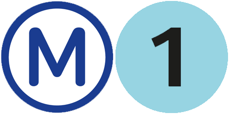 Logo de la ligne 1 du métro d'alger